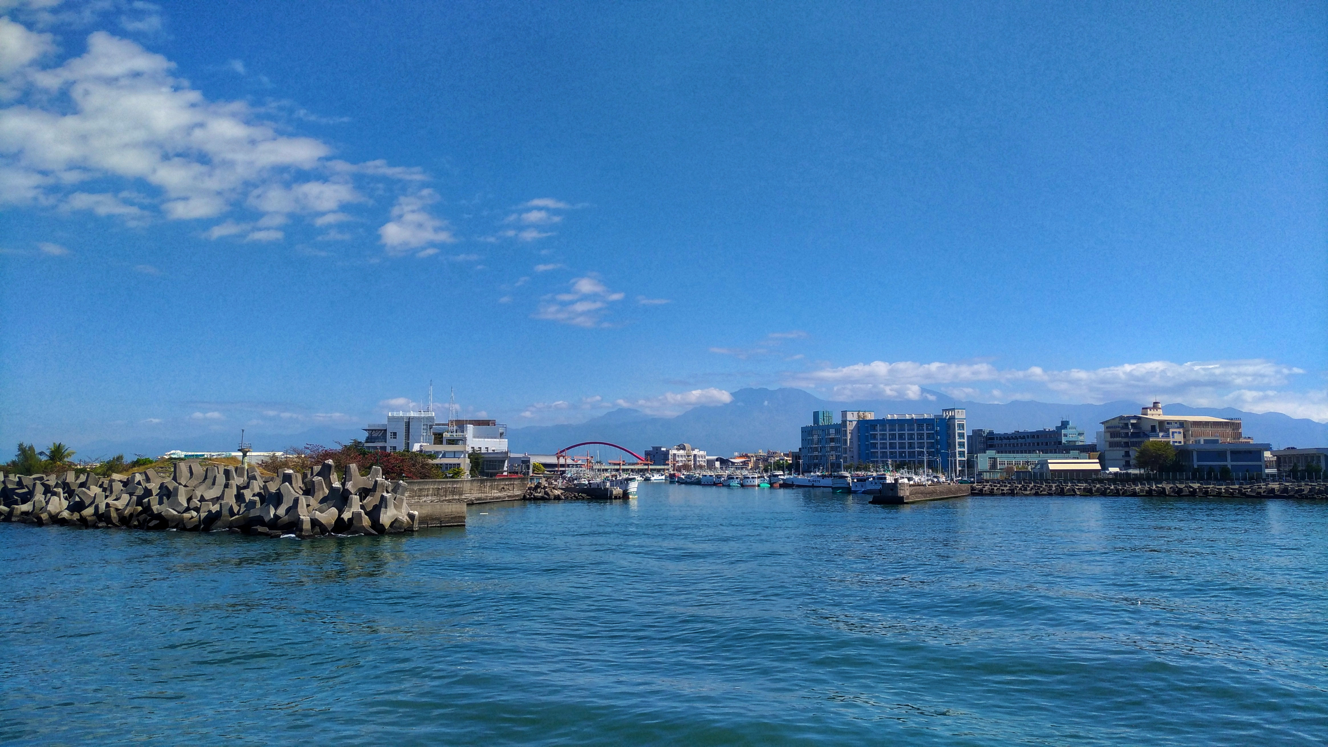 東港鹽埔漁港，位於臺灣屏東縣東港鎮與新園鄉的漁業專用港口